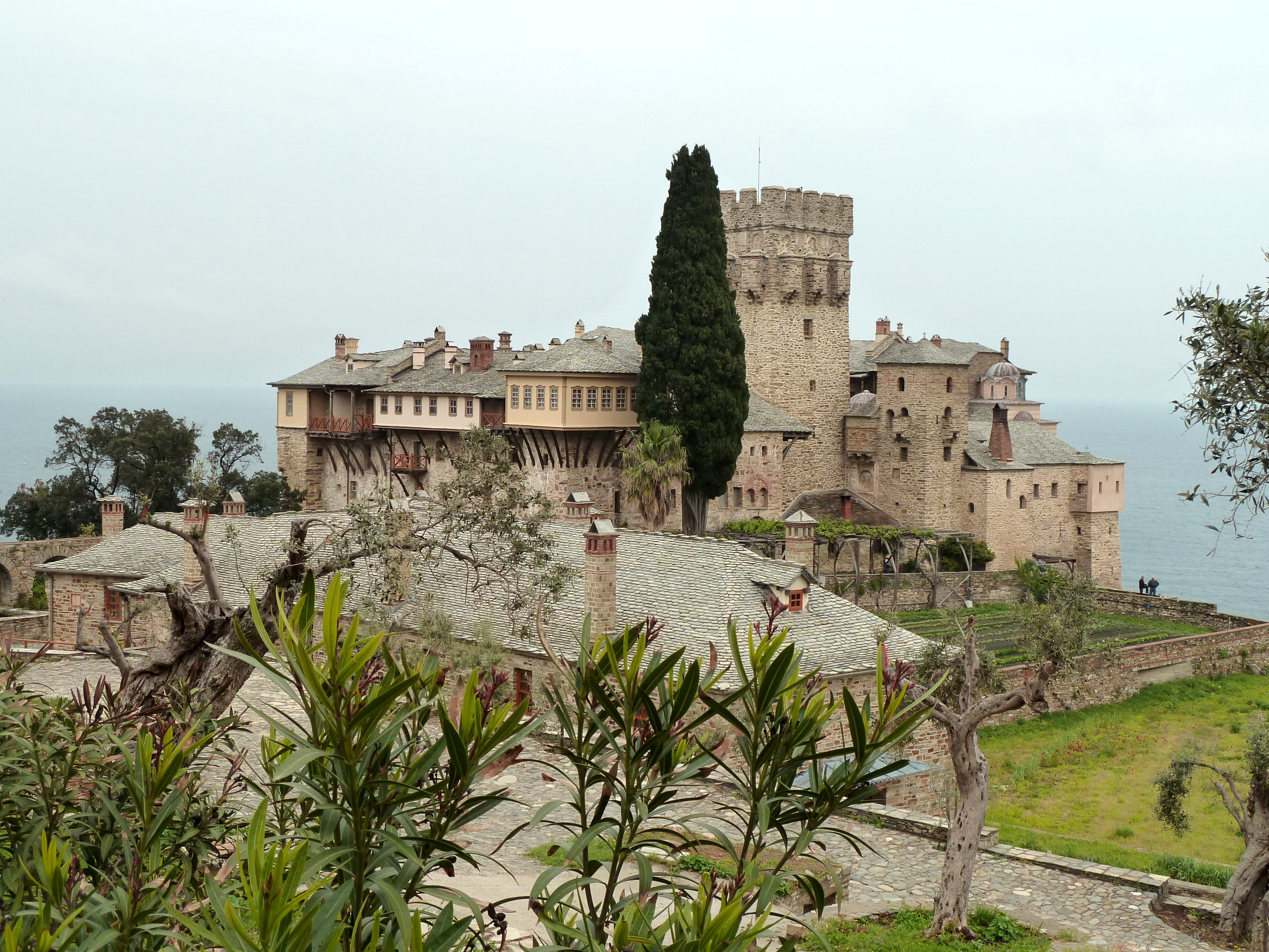 Vue extérieure du monastère Stavronikita (Mont Athos)